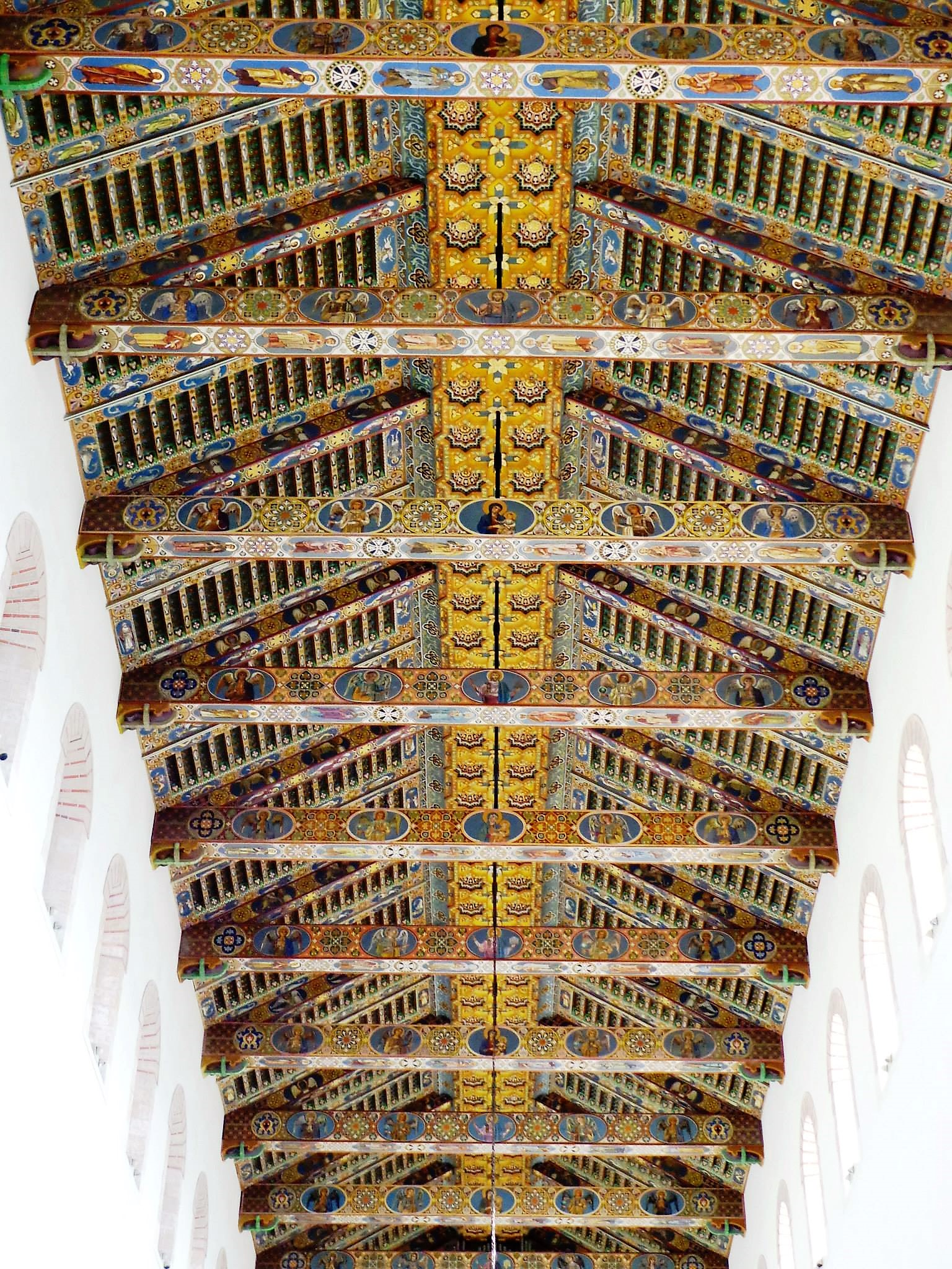 Dettaglio tetto ligneo